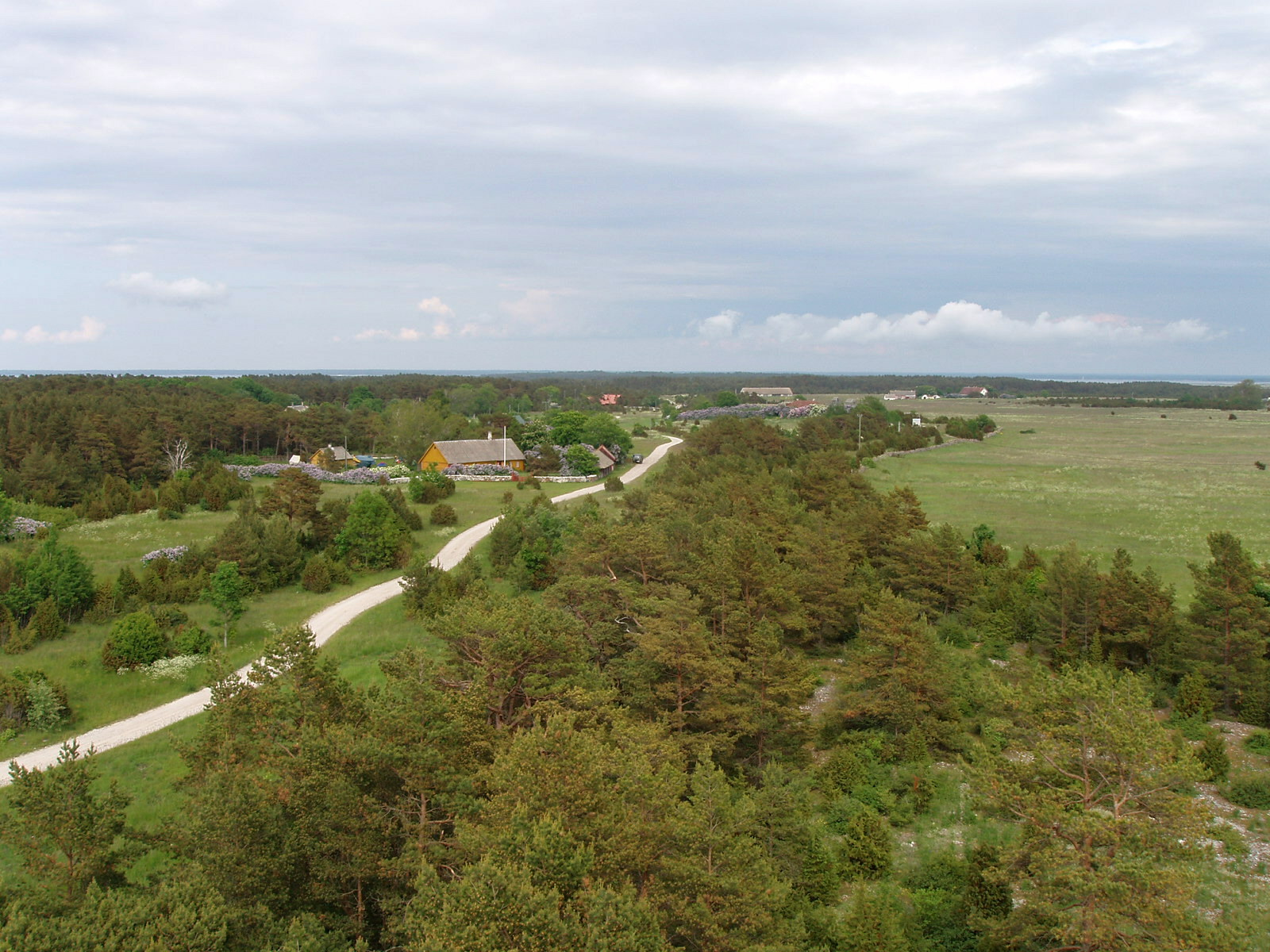 Vilsandi vaatlustornist